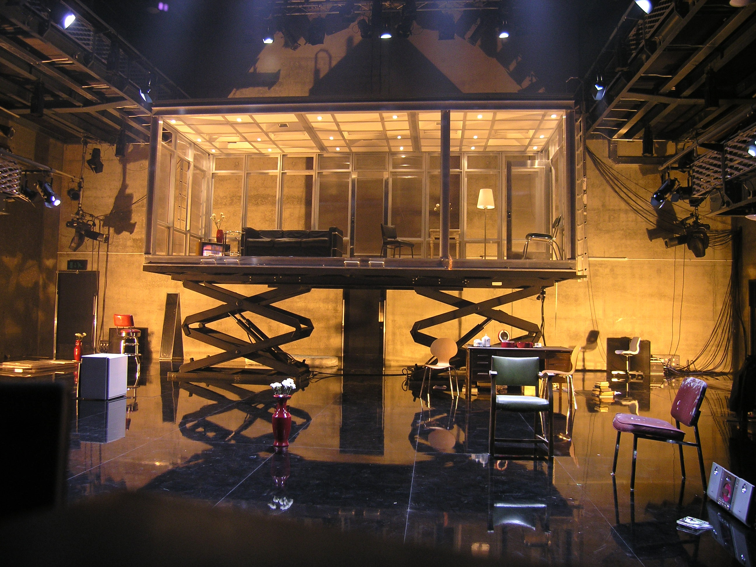 מחלת נעורים, במאי גדי רול, מעצב תפאורה רוני תורן, מעצבת תלבושות מוניקה ניסבט, מעצב תאורה מרק האוולנד, קובנטרי, אנגליה 2007